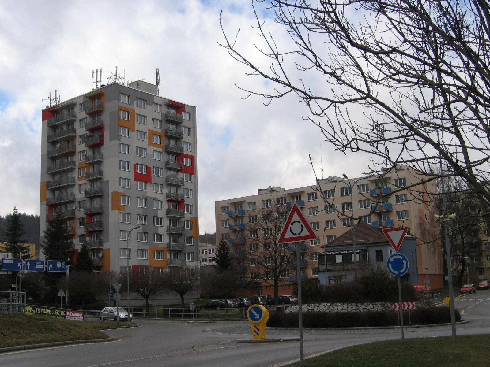 Zvolenská ulice v Prachaticích